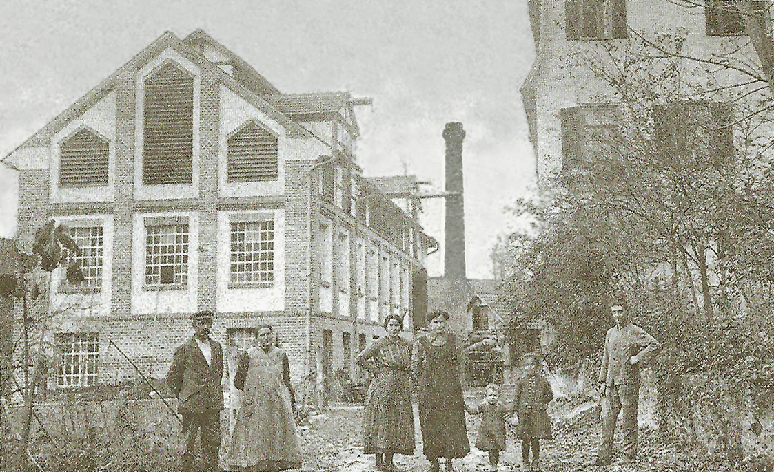 Fabrikantenfamilie Friederich vor dem 1911 erbauten, 1969 aufgegebenen und 1971 abgerissenen Fabrikgebäude der Papiermühle im Glemstal bei Markgröningen